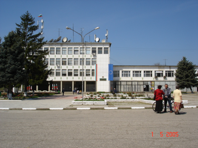 Centrum of Bregovo/Bulgaria